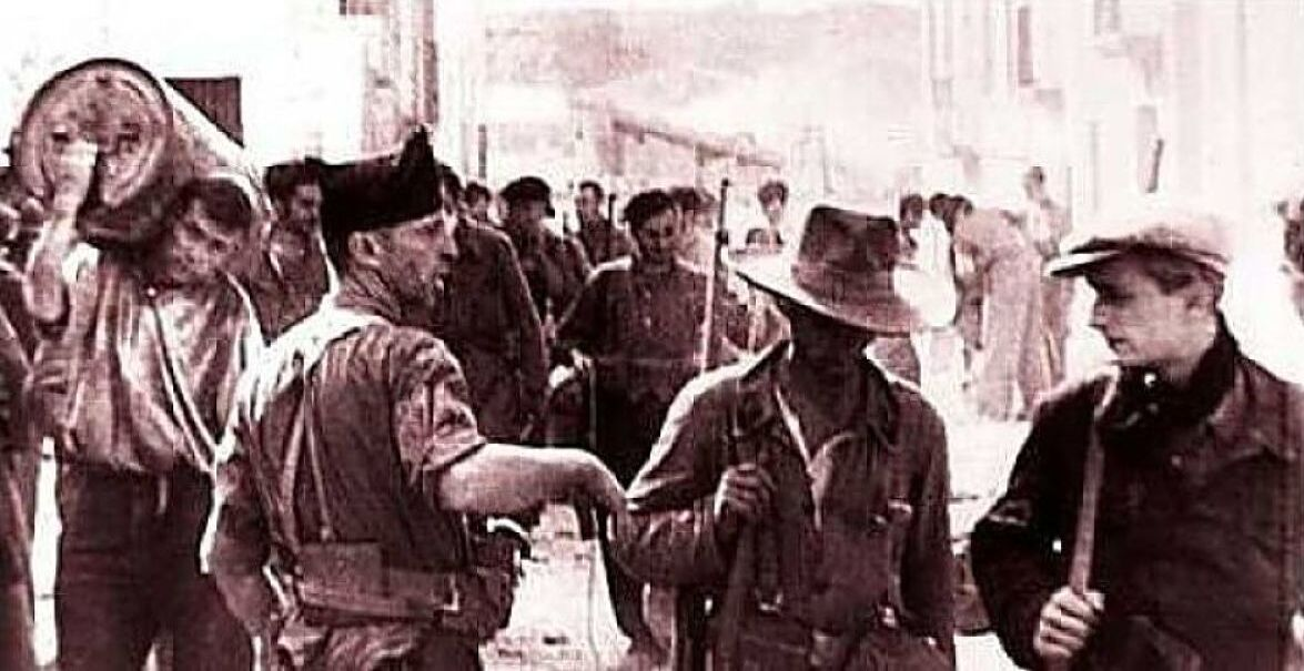 Le Groupe international de la colonne Durruti à Siétamo en septembre 1936 : au centre, Antoine GIMENEZ coiffé d'un chapeau, et Charles RIDEL/Louis MERCIER VEGA à sa gauche avec une casquette.